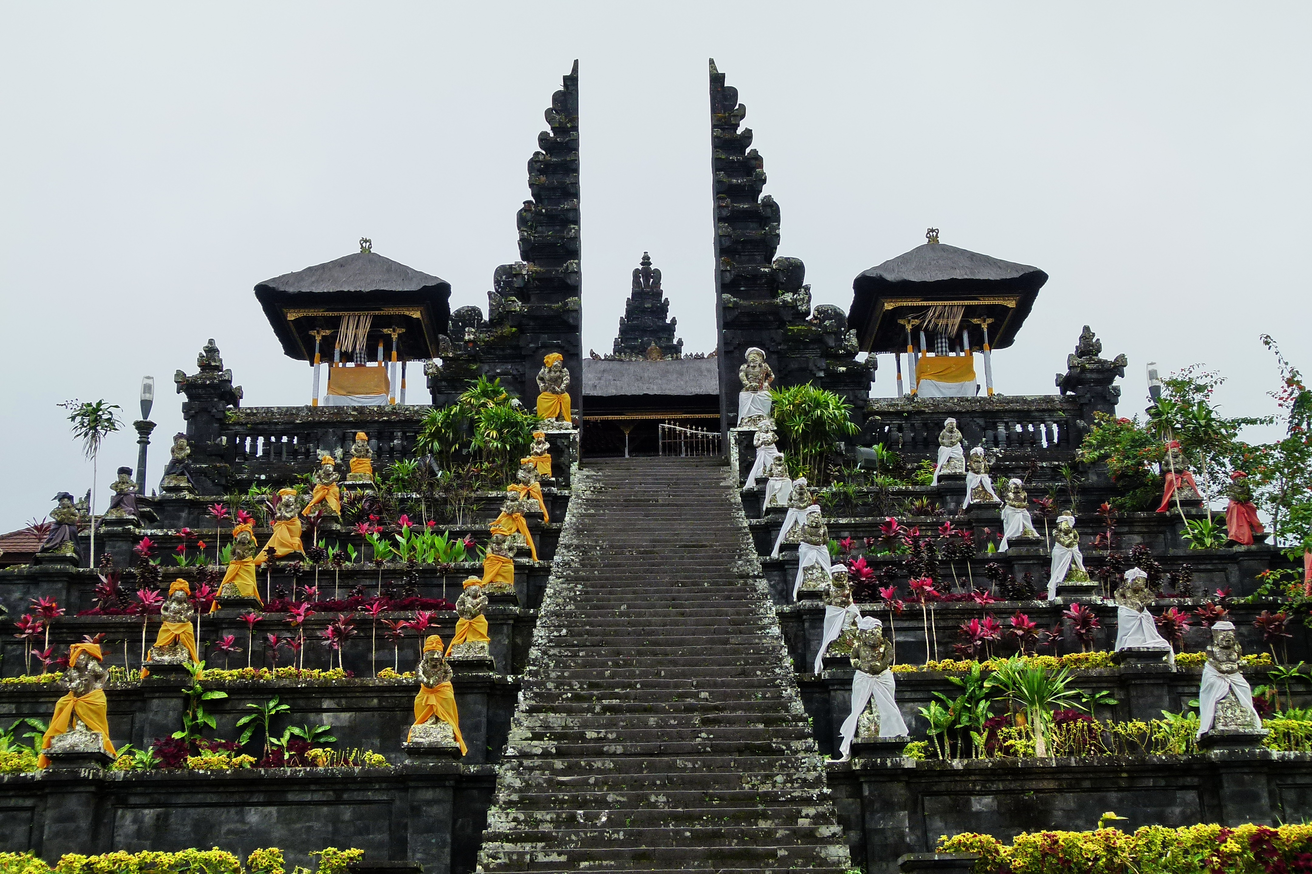 Muttertempel Pura Besakih auf Bali